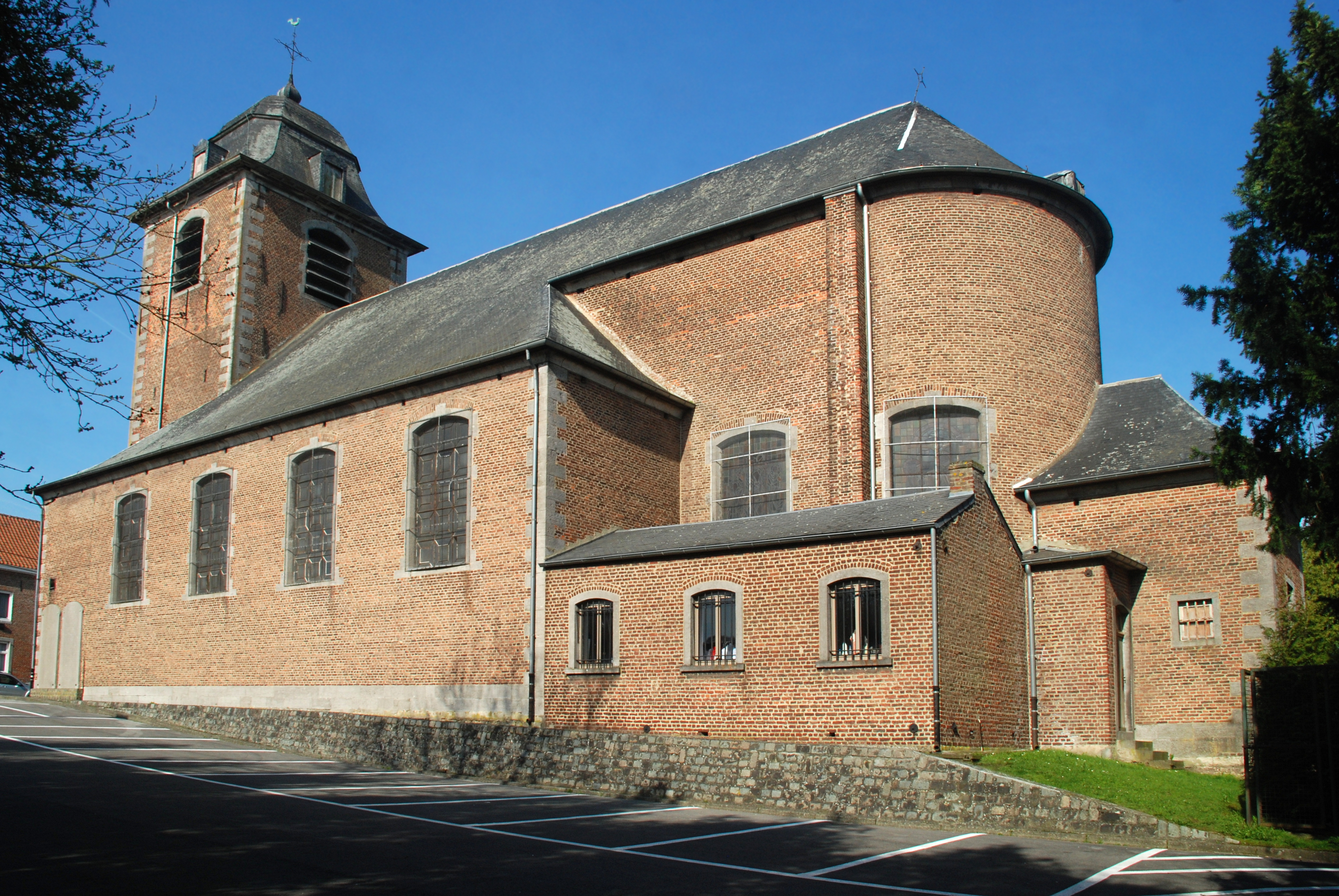 Belgique - Brabant wallon - Genappe - Baisy-Thy - Église Saint-Hubert